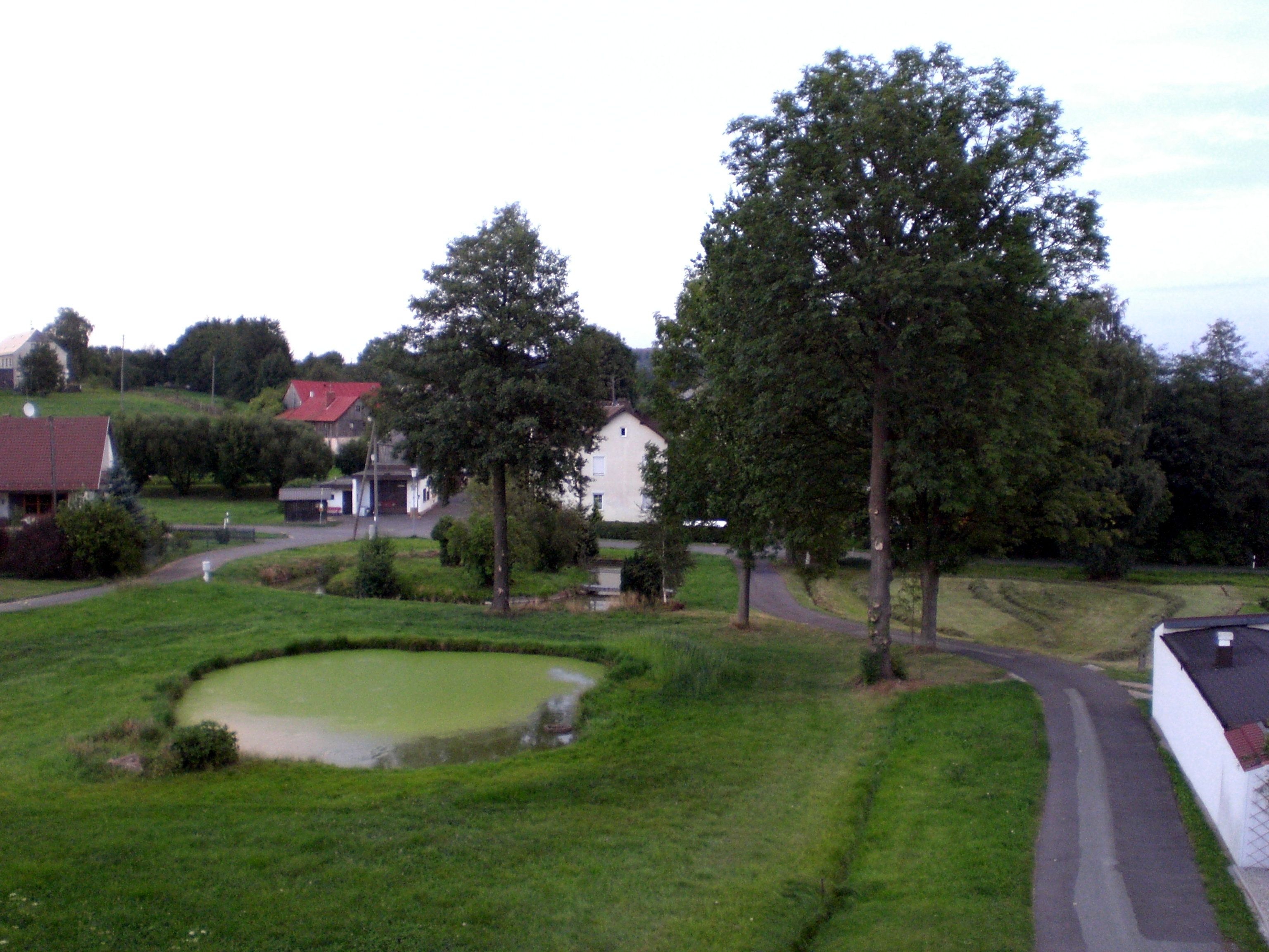 Dieses Foto zeigt den Ortskern von Wildenau bei Selb aus Süd-West-Richtung